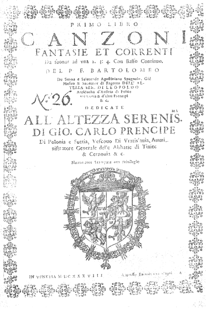 Page de titre des Canzoni, fantasie et correnti de Bartolomé de Selma y Salaverde.